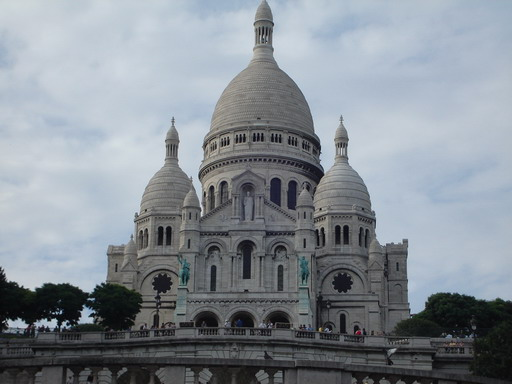 Sacré Cœur-bazilika, Párizs